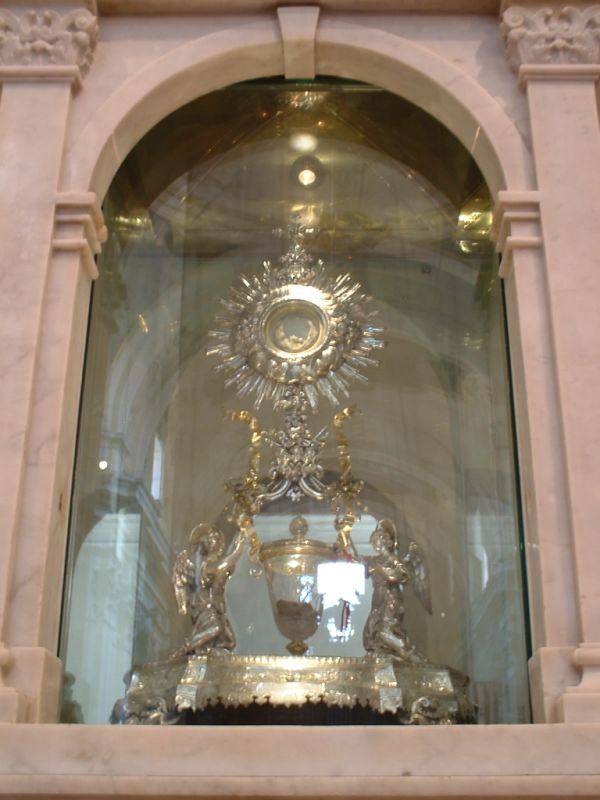 Monstrancja zawierająca Ciało i Krew przechowywana w kielichu z kryształu górskiego